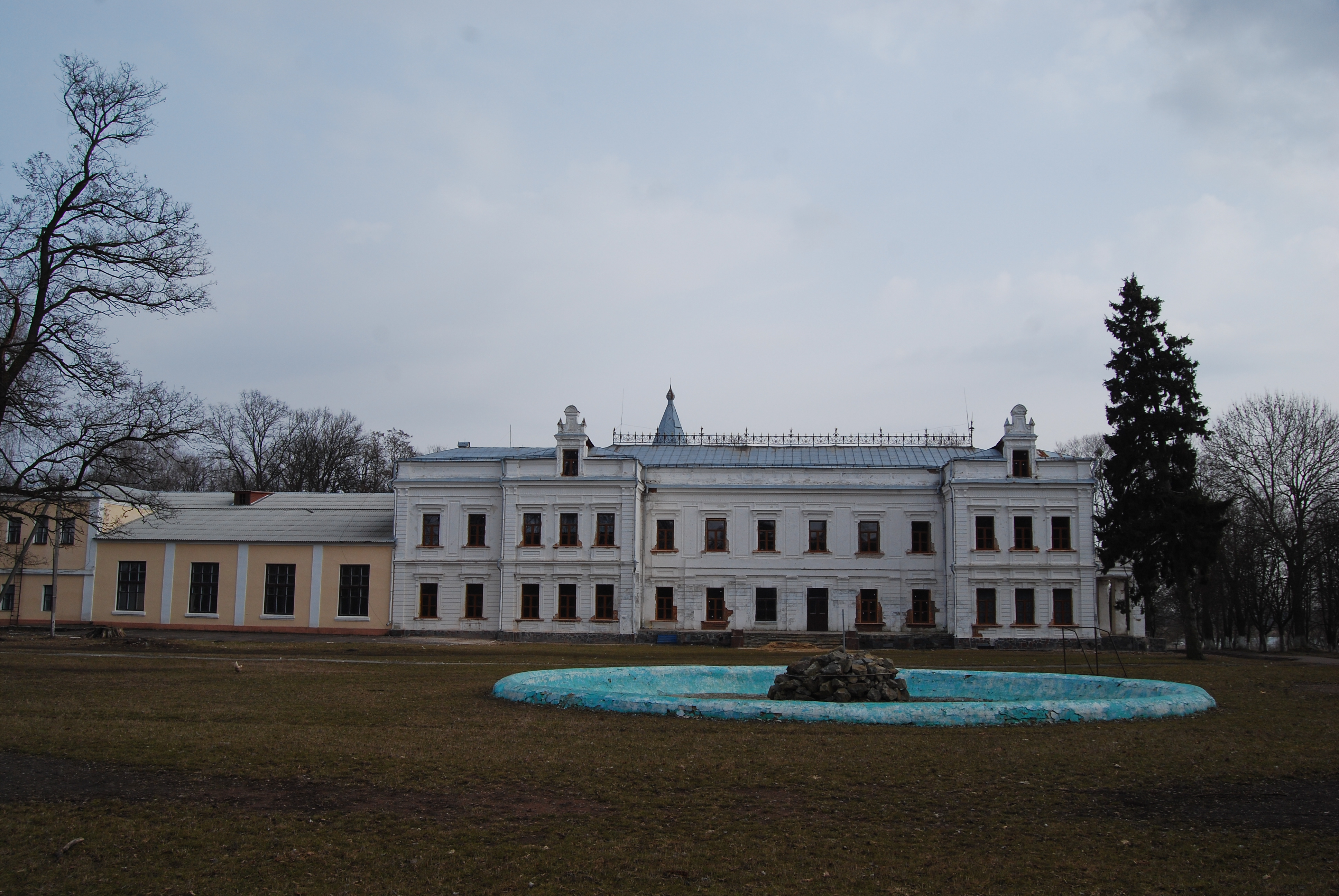 Садиба М.Терещенка (мур.), Андрушівка, вул.Леніна, 28